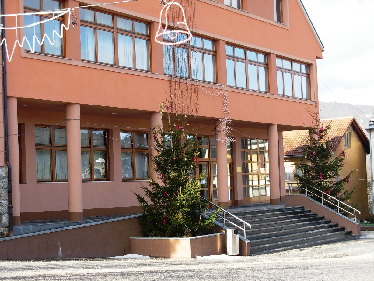 Sjedište Opštine Mrkonjić Grad.